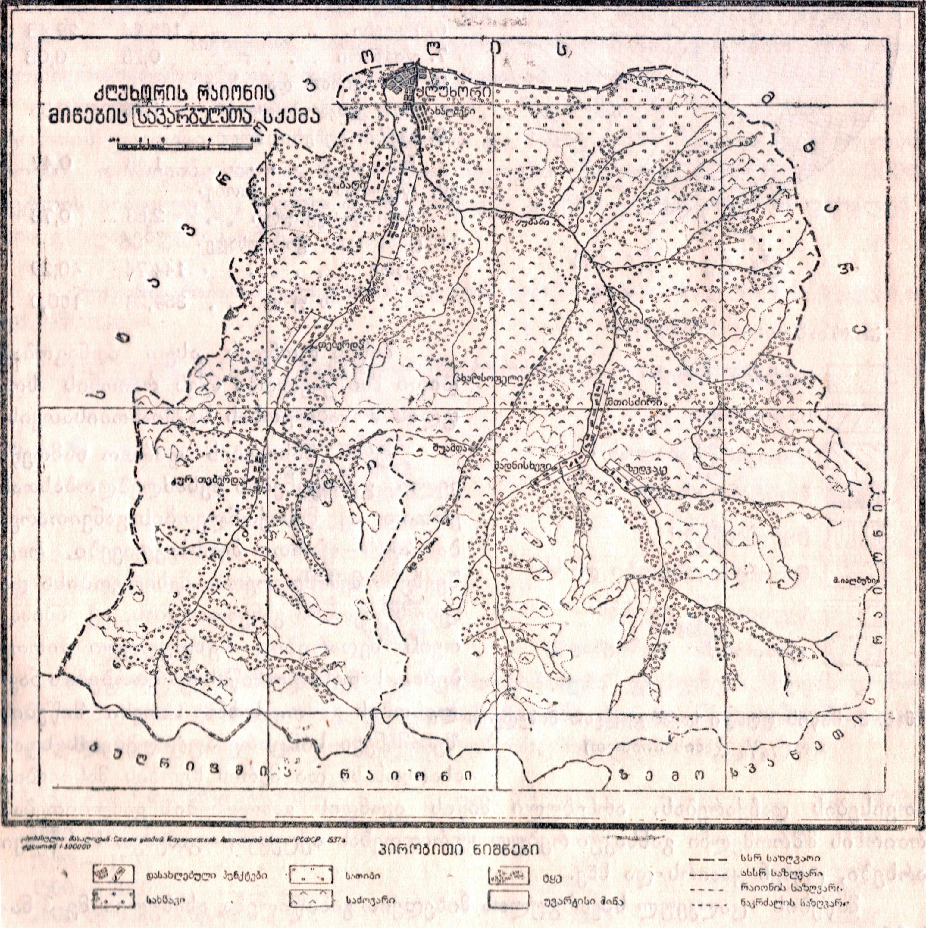 ქლუხორის რაიონის მიწების სავარგულთა გეგმა